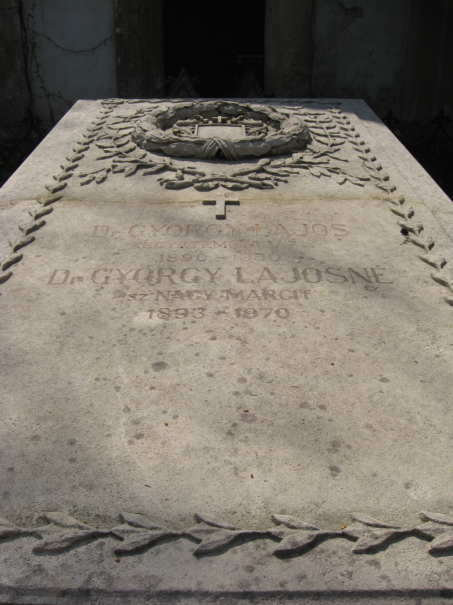 György Lajos (irodalomtörténész) sírja a kolozsvári Házsongárdi temetőben.